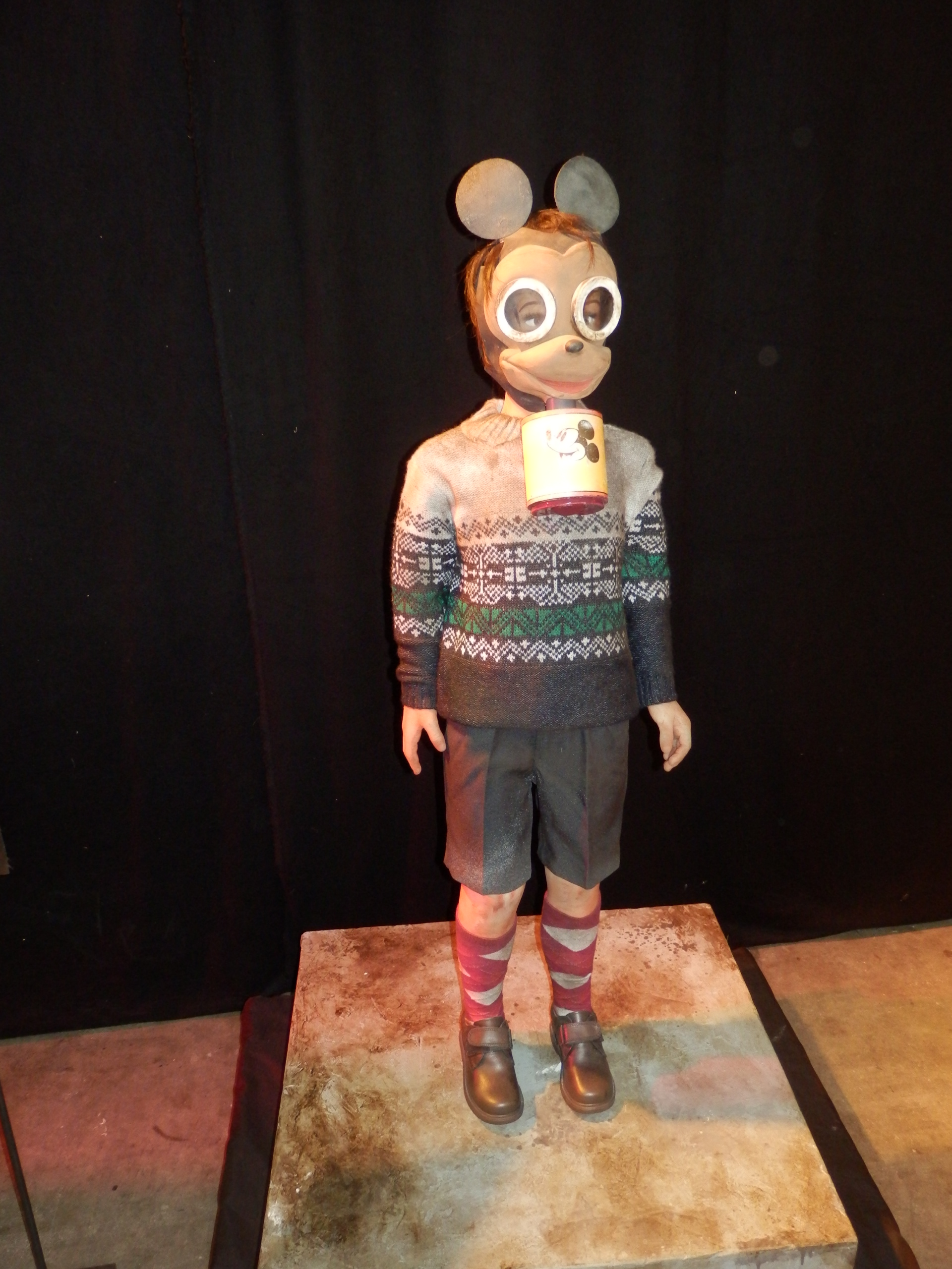 Recreación del uso de una máscara de gas por un niño.